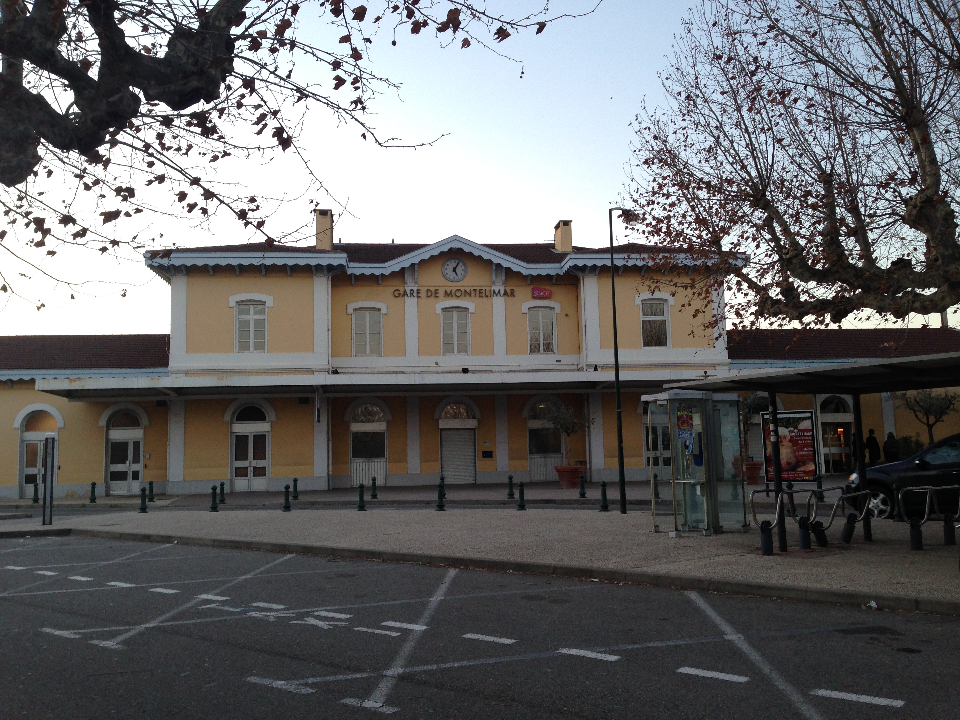 Gare de Montélimar en Janvier 2015